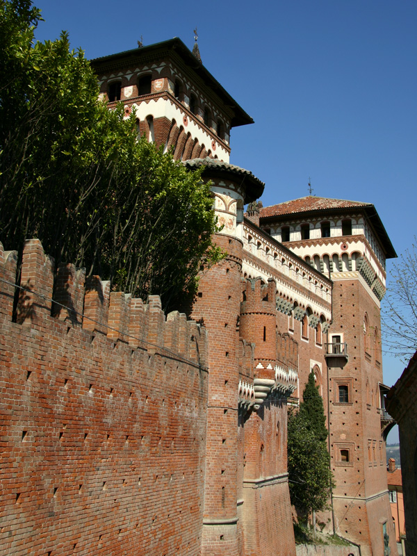 Il castello di Cesereto Monferrato (AL)